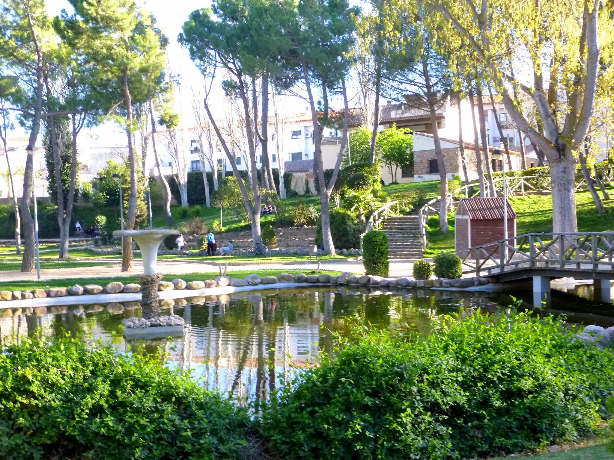 Parque de Nuestra Señora de la Caridad (Villarrobledo, Albacete)